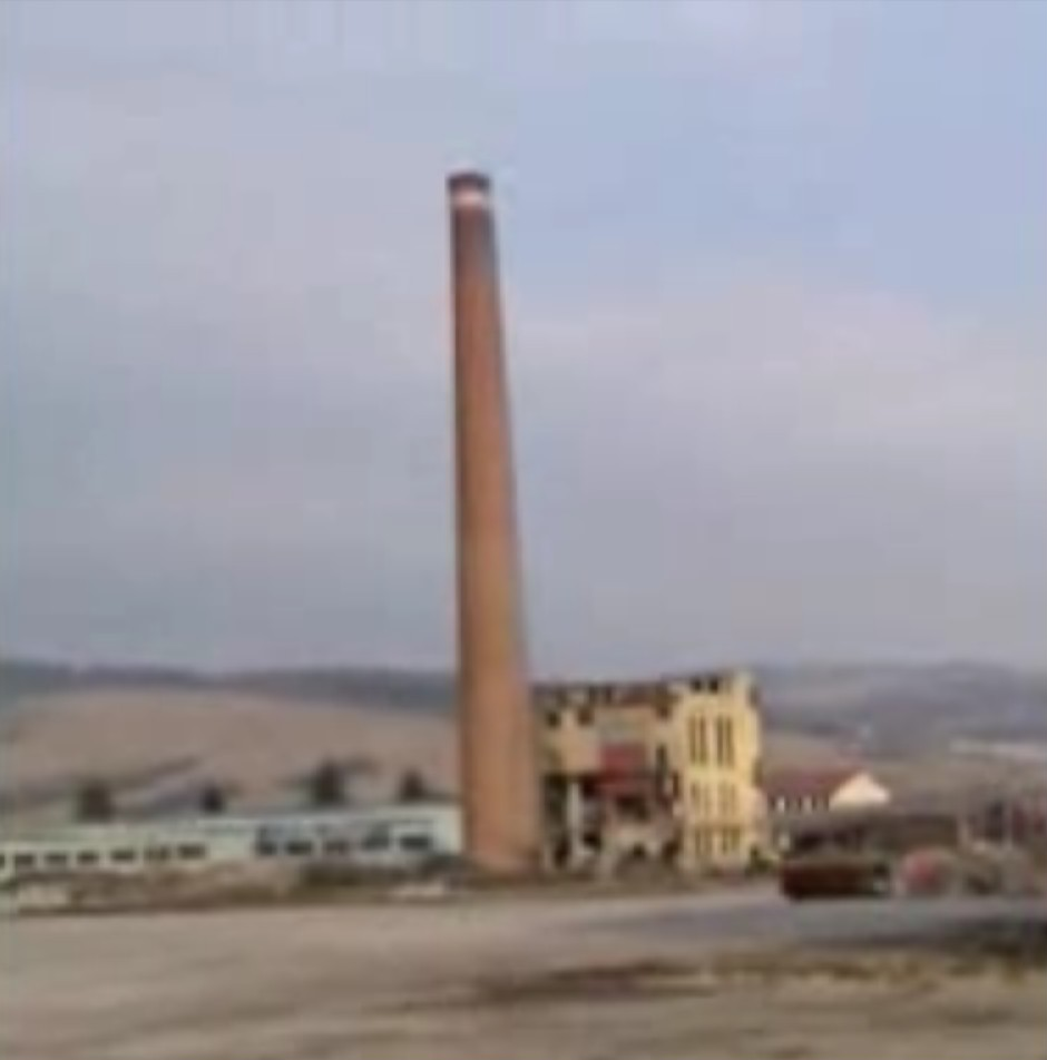 starý tehlový komín z drevárského závodu DREVINA v Krásne nad Kysucou. Postavený v 40. rokoch 20.storočia.